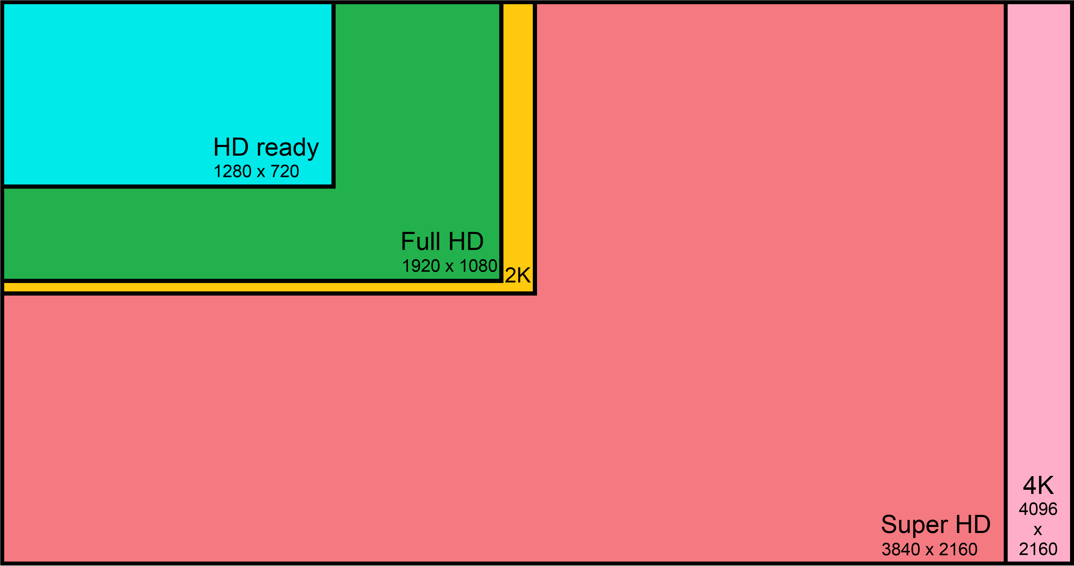 questa è un'immagine che mette a confronto graficamente e realisticamente le risoluzioni HD Ready, Full HD, 2K, Super HD e 4K (in CinemaScope con 2160 linee verticali); l'immagine alla massima risoluzione di pixel è in scala 1:1.